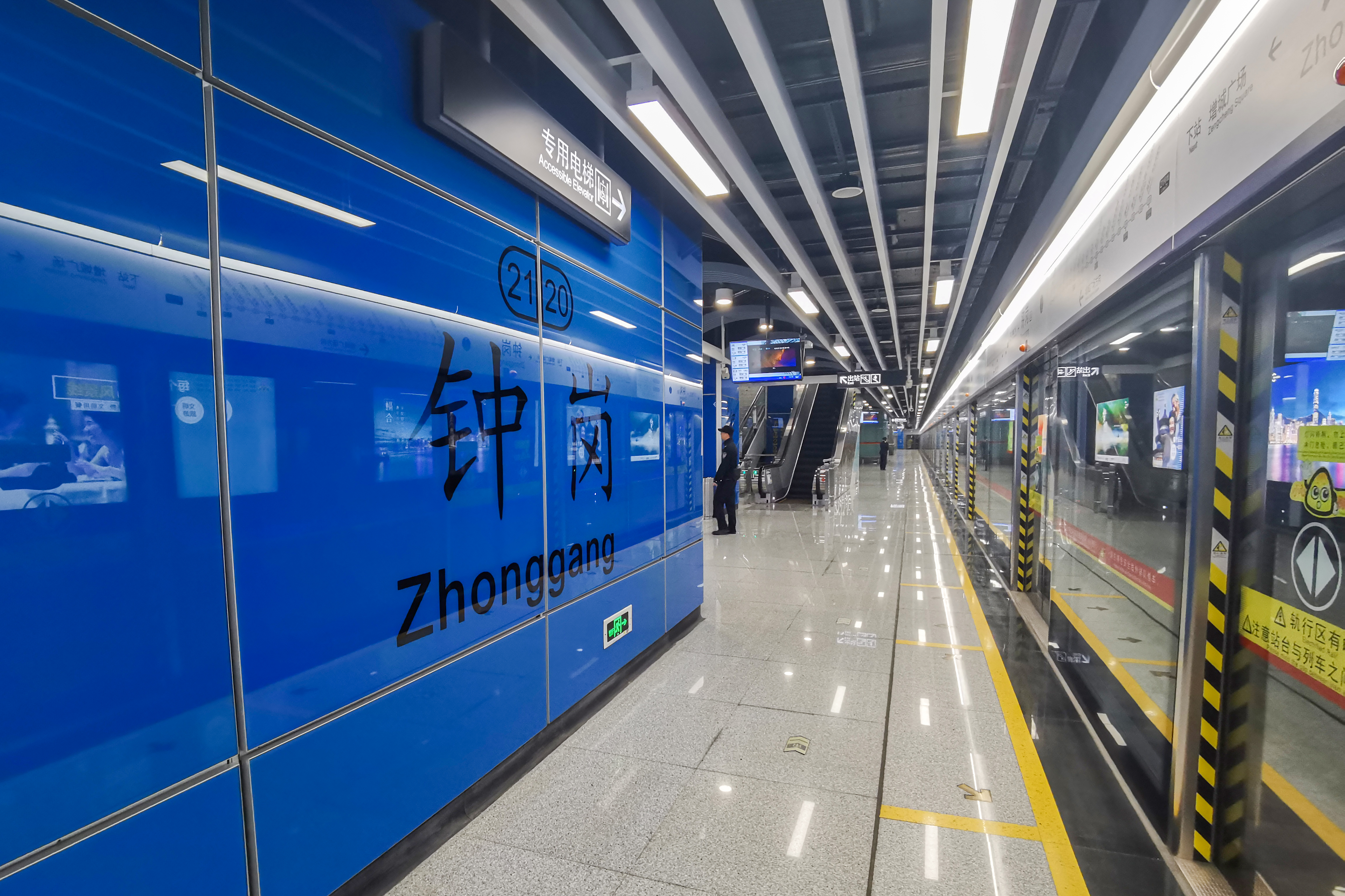 广州地铁钟岗站